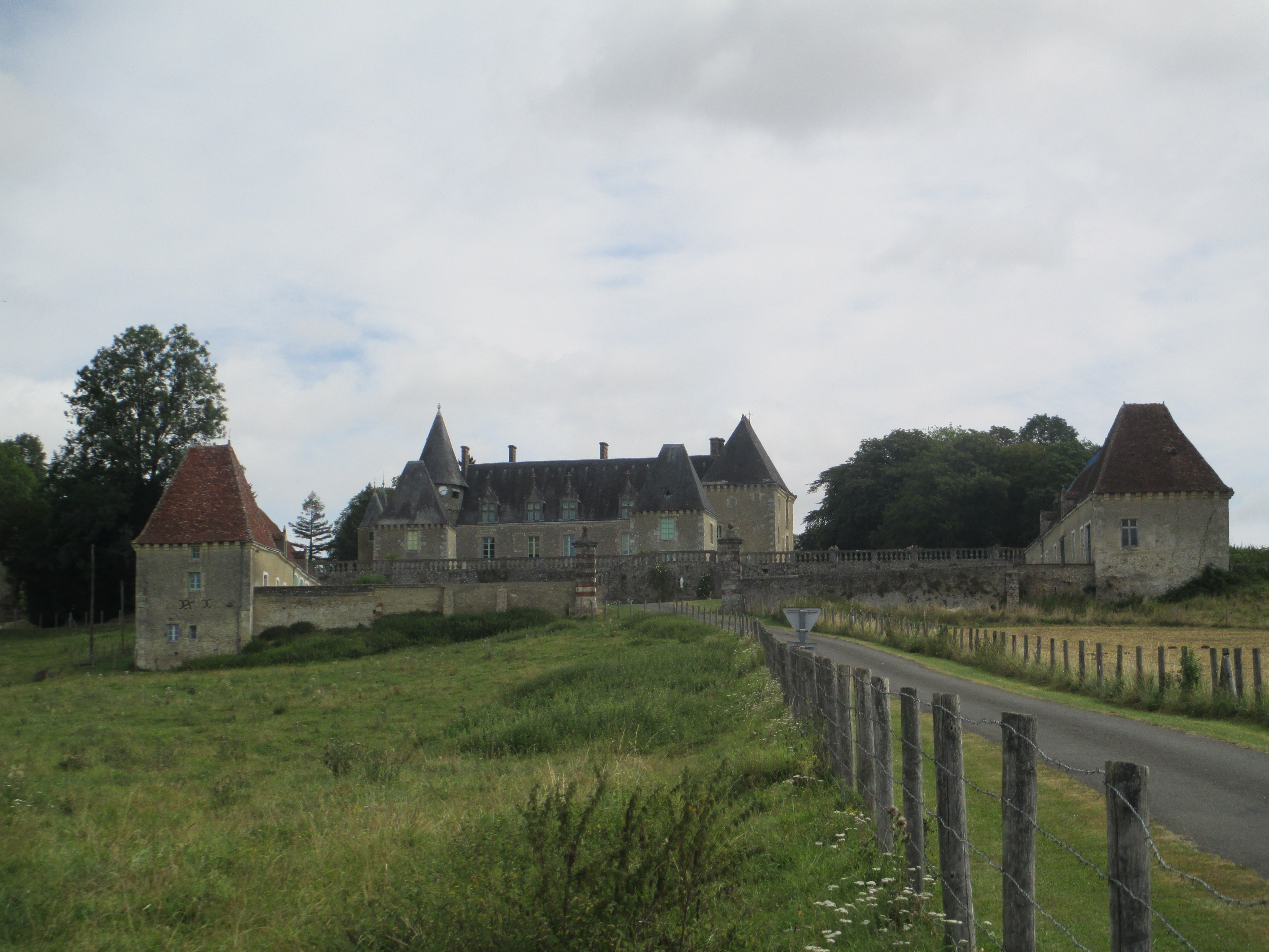 Château des Feugerets, sur les communes d'Appenai sous Bellême et de la Chapelle-Souëf dans l'Orne (FRANCE) .